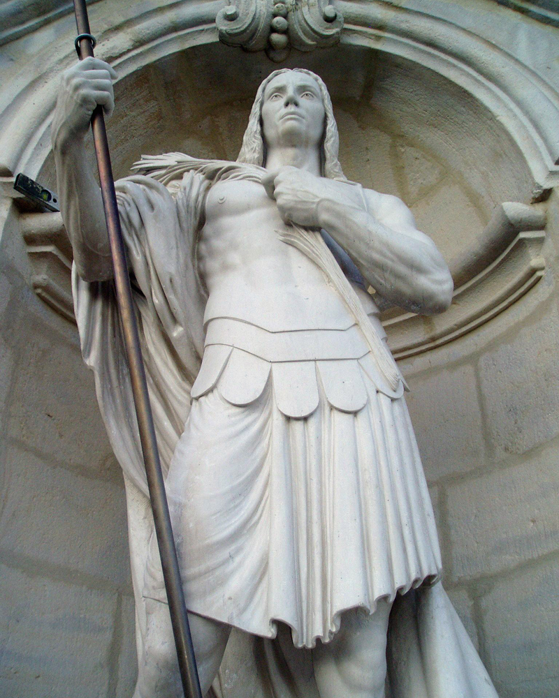 Sant Hipòlit - Jordi Díez Fernández